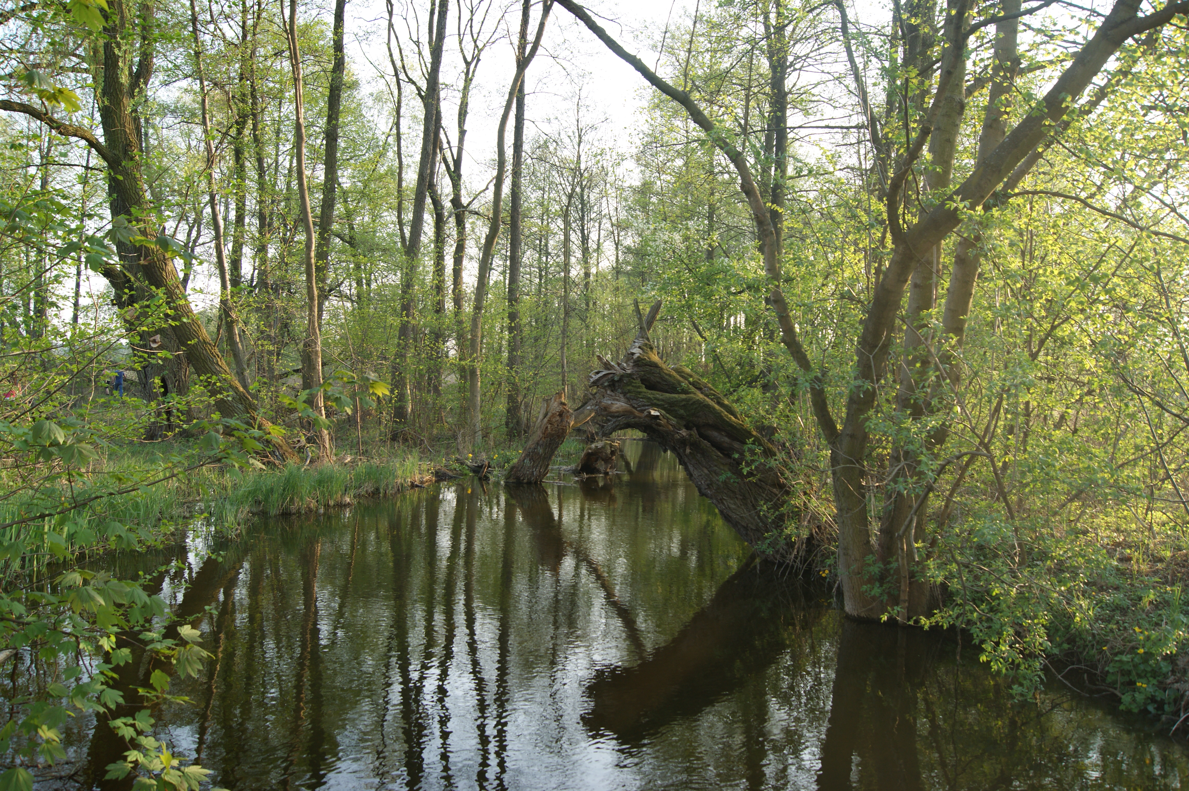 Rzeka Oszczenica w Chrzypsku Wielkim